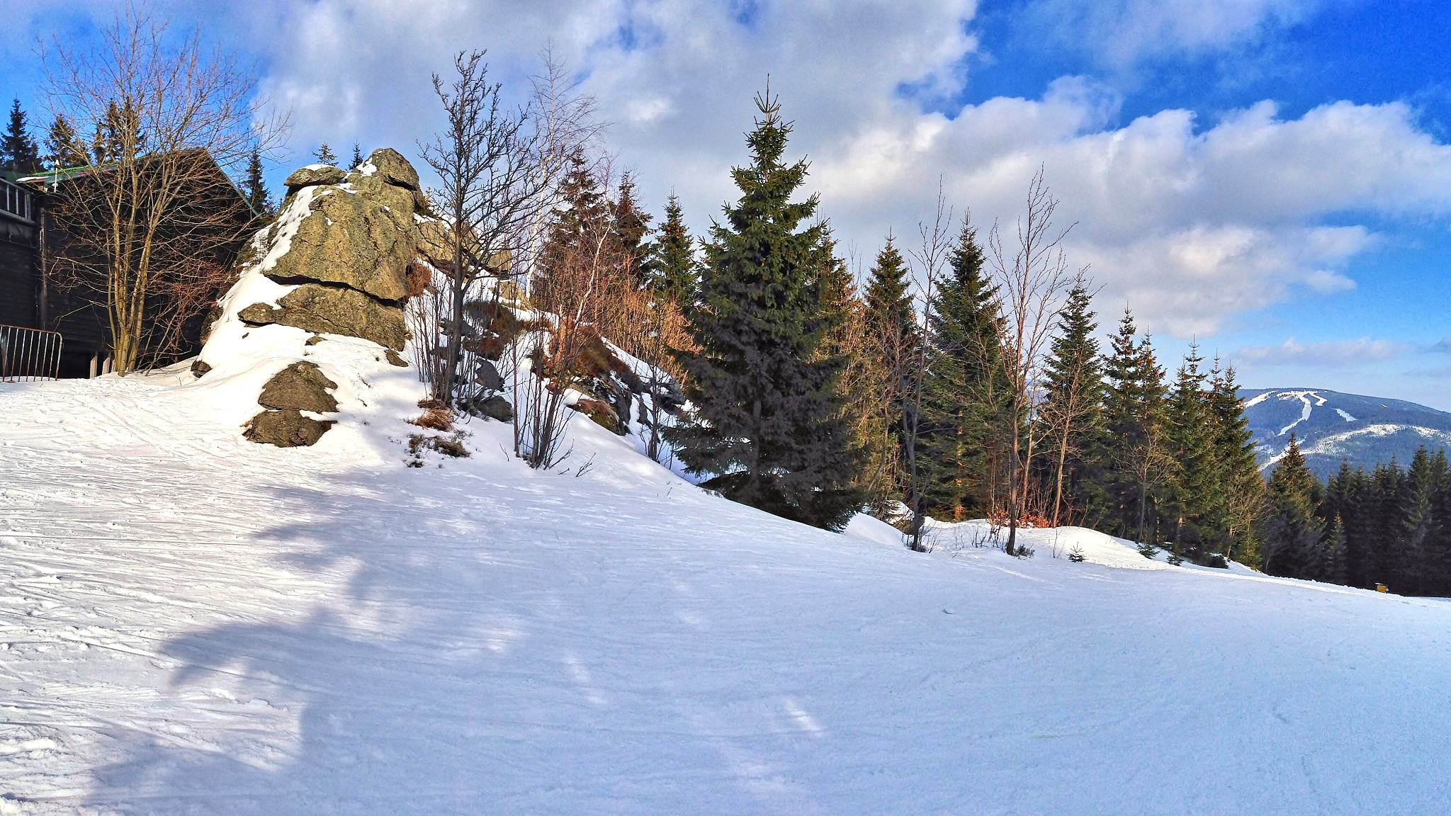 Hornomísečská skála v Krkonoších (1047 m n. m.)